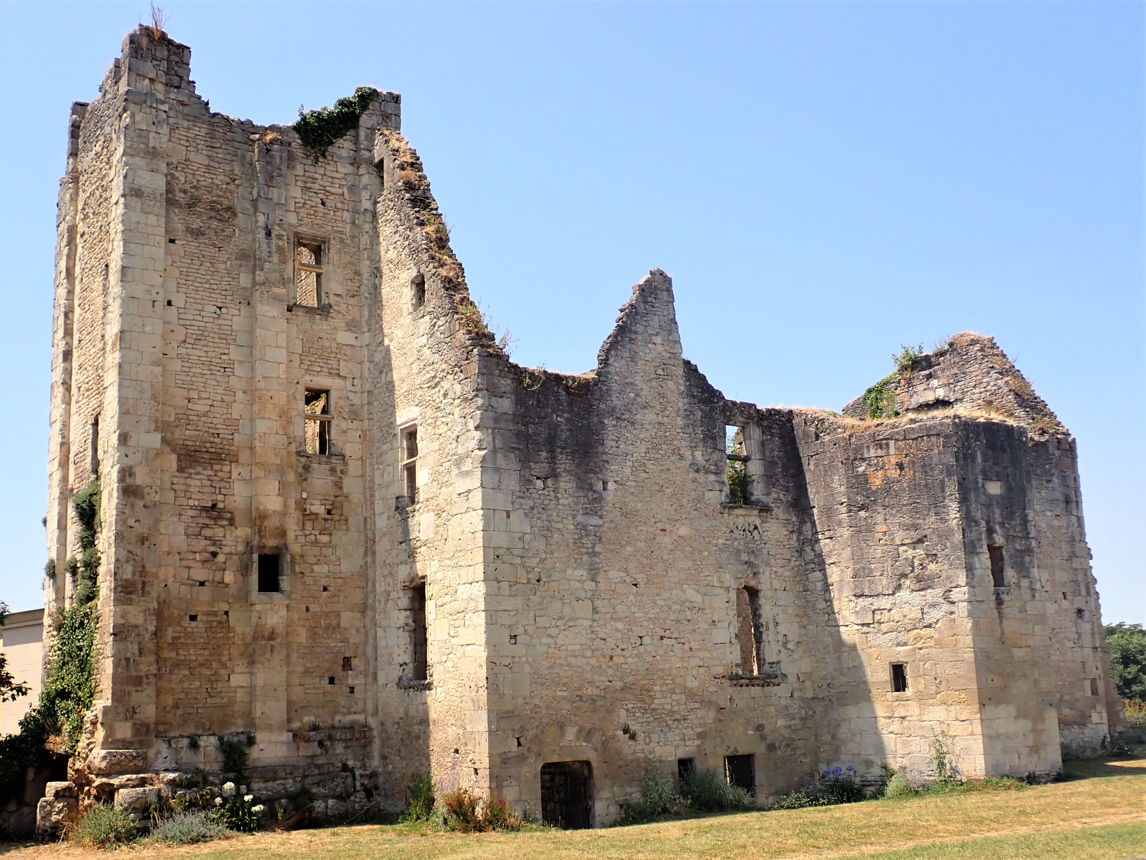 Ruine des Chateau Barriere in Perigueux